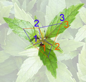 Archimenes erecta, l'image illustre le mécanisme de la phyllotaxie